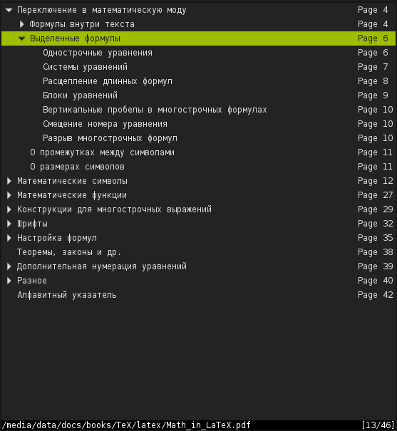 Режим оглавления в программе zathura